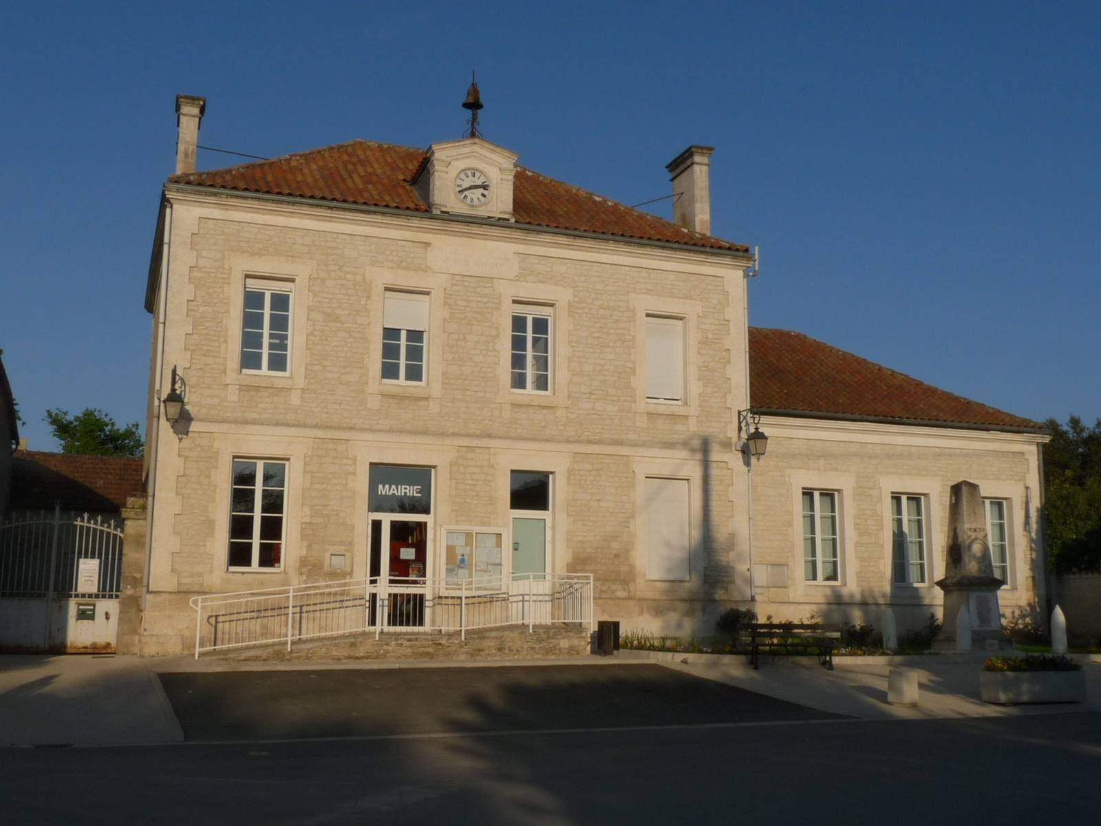 Mairie de Douzat, Charente, France